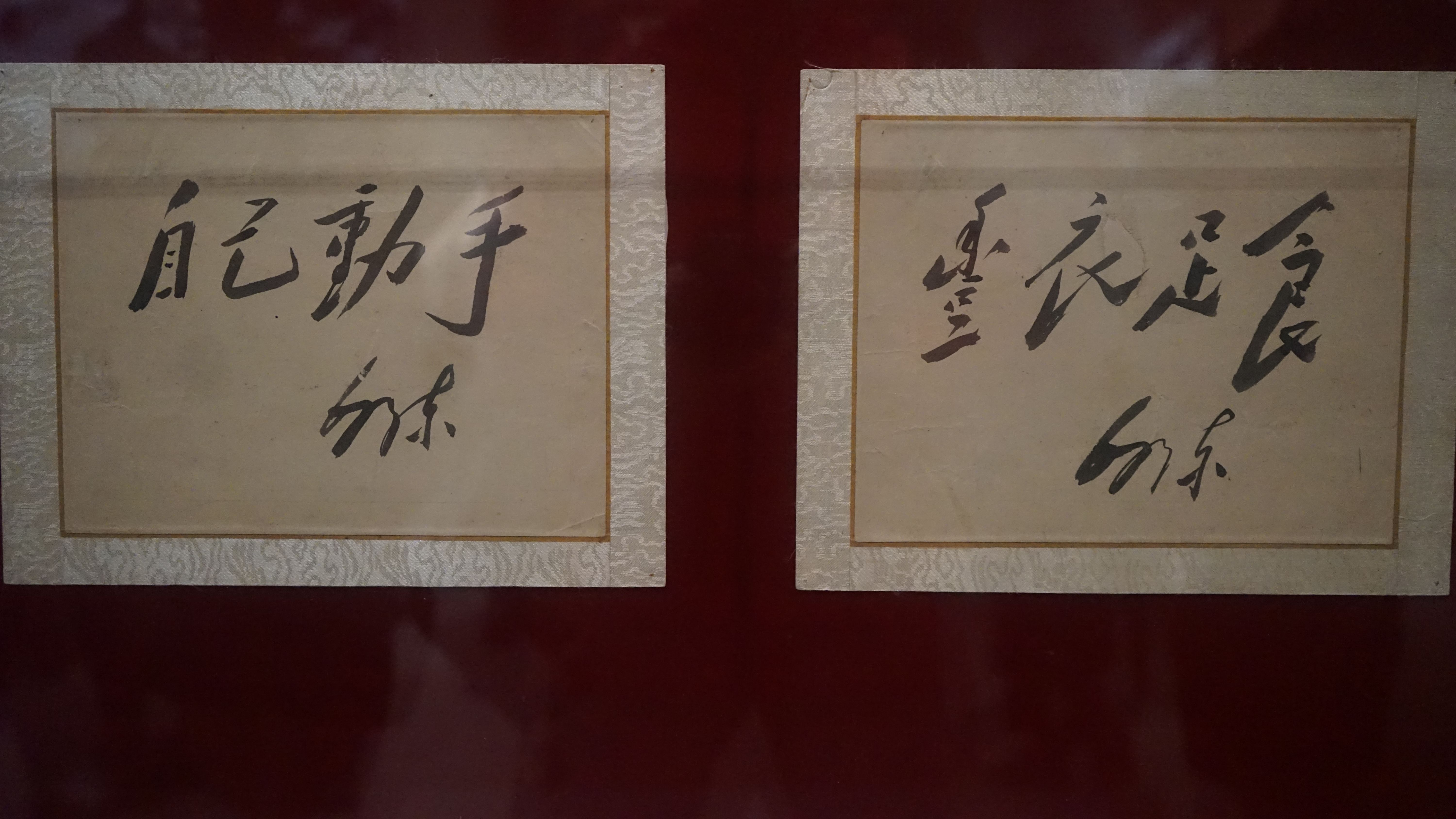 中文（中国大陆）: 1943年毛泽东在延安给电影《南泥湾》的题词“自己动手，丰衣足食”。一级文物